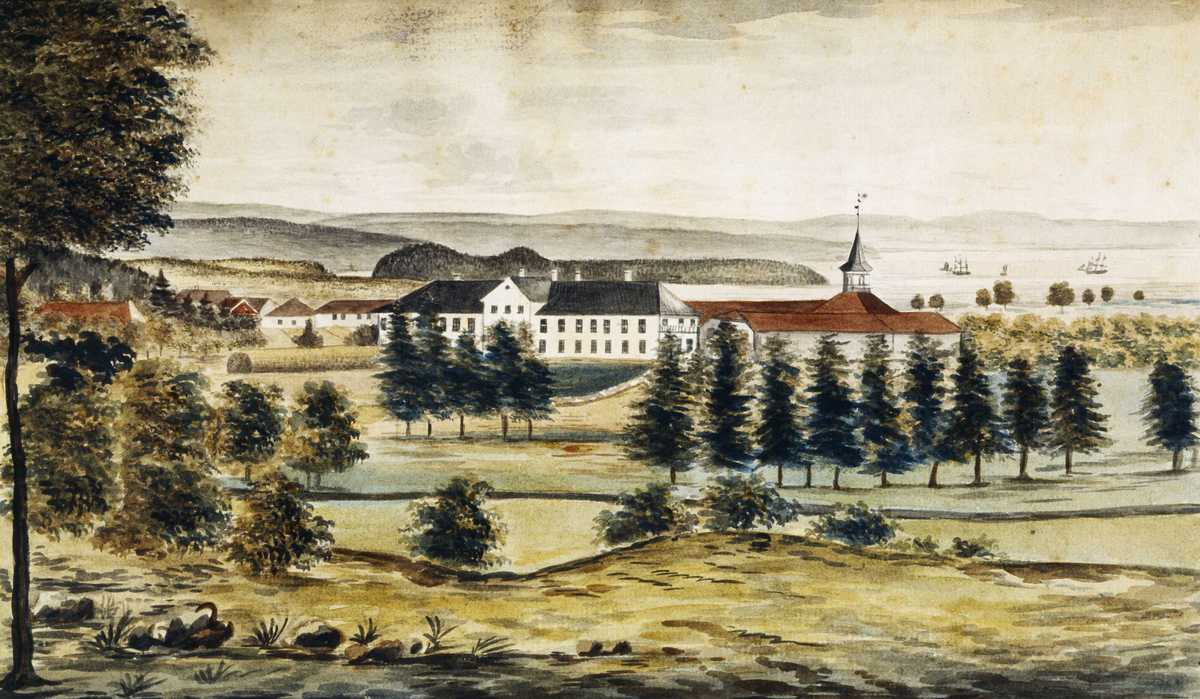 Frogner Hovedgård ca. 1815, akvarell. Tilhører Oslo Museum